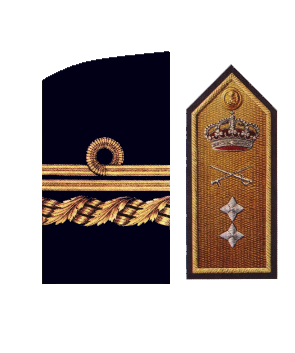 Divisas de Vicealmirante de la Armada española. Bocamanga (Dcha.) y pala (Izda.)